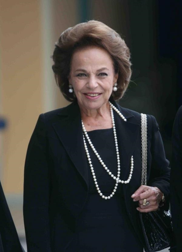 leb zgharta